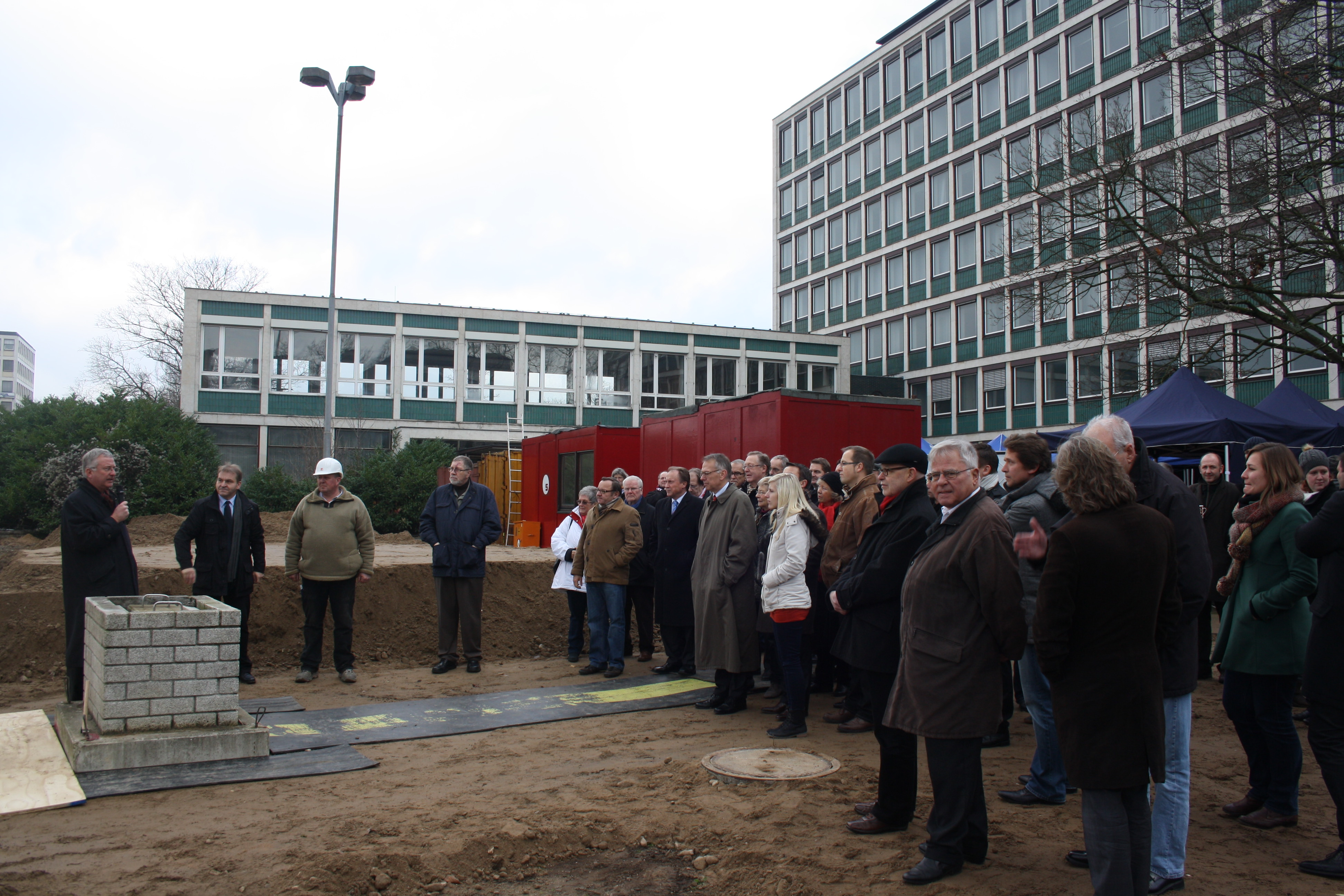 Stadthalle Grundsteinlegung Nov 2012 011